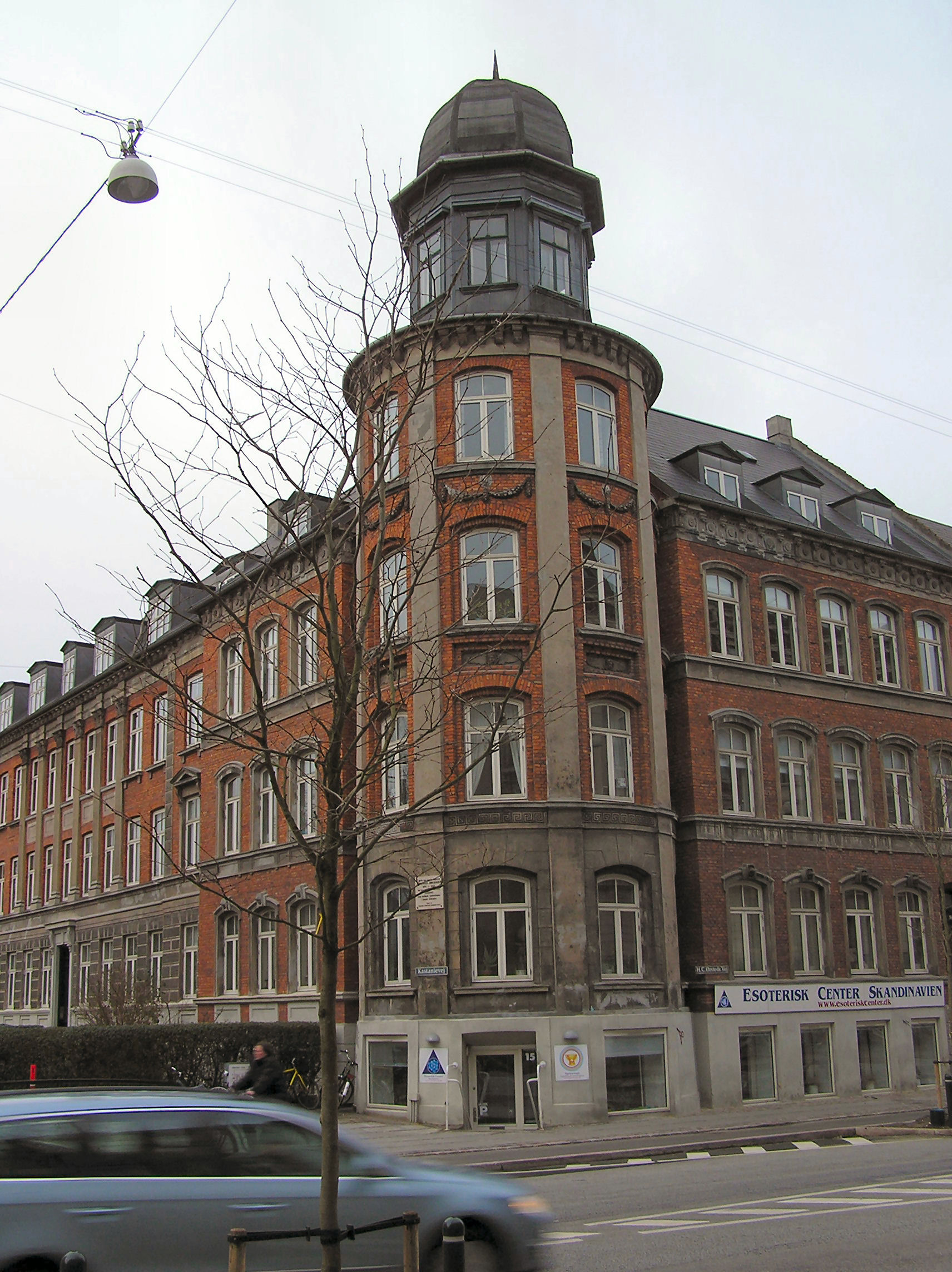 The house on Frederiksberg (part of Copenhagen), where Johannes Joergensen lived 1891-93 at the top. His literary periodical Taarnet (The Tower) got its name from the corner tower. Huset på Frederksberg, hvor Johannes Jørgensen boede og udgav symbolismens talerør, tidsskriftet Taarnet.